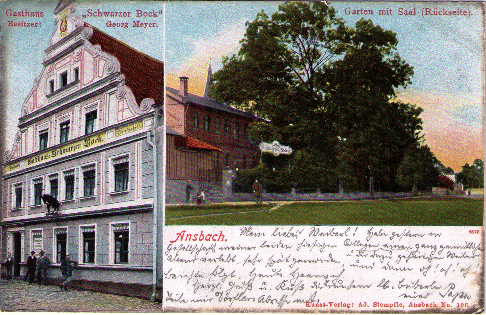 Barocisierte Fassade in Scraffito-Technik und Gartensaal mit altem Satteldach, sowie Bock-Figur noch auf Matallständer.